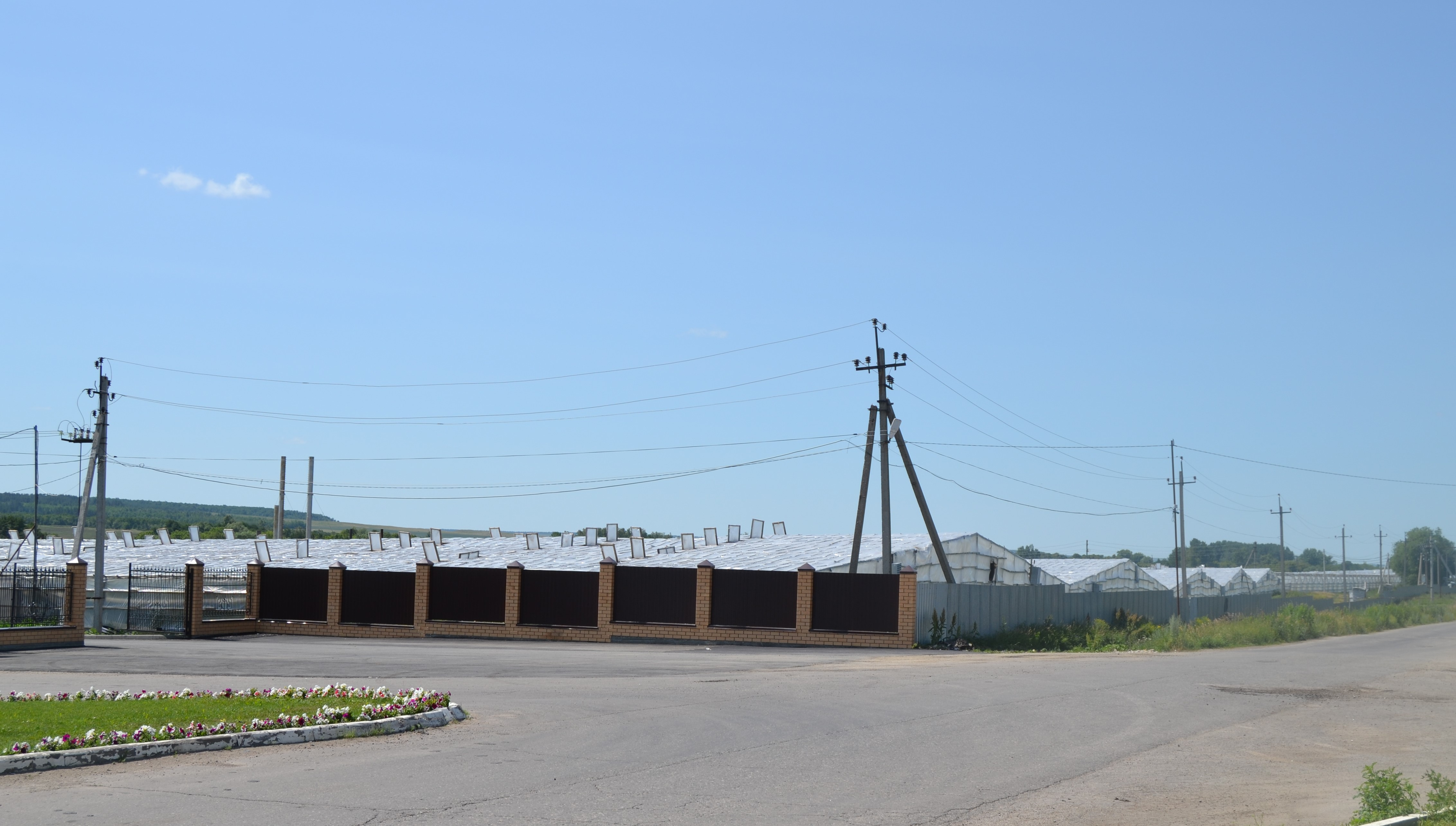 Изображение населённого пункта. Тепличное хозяйство (Константиновка, Саратовский район)